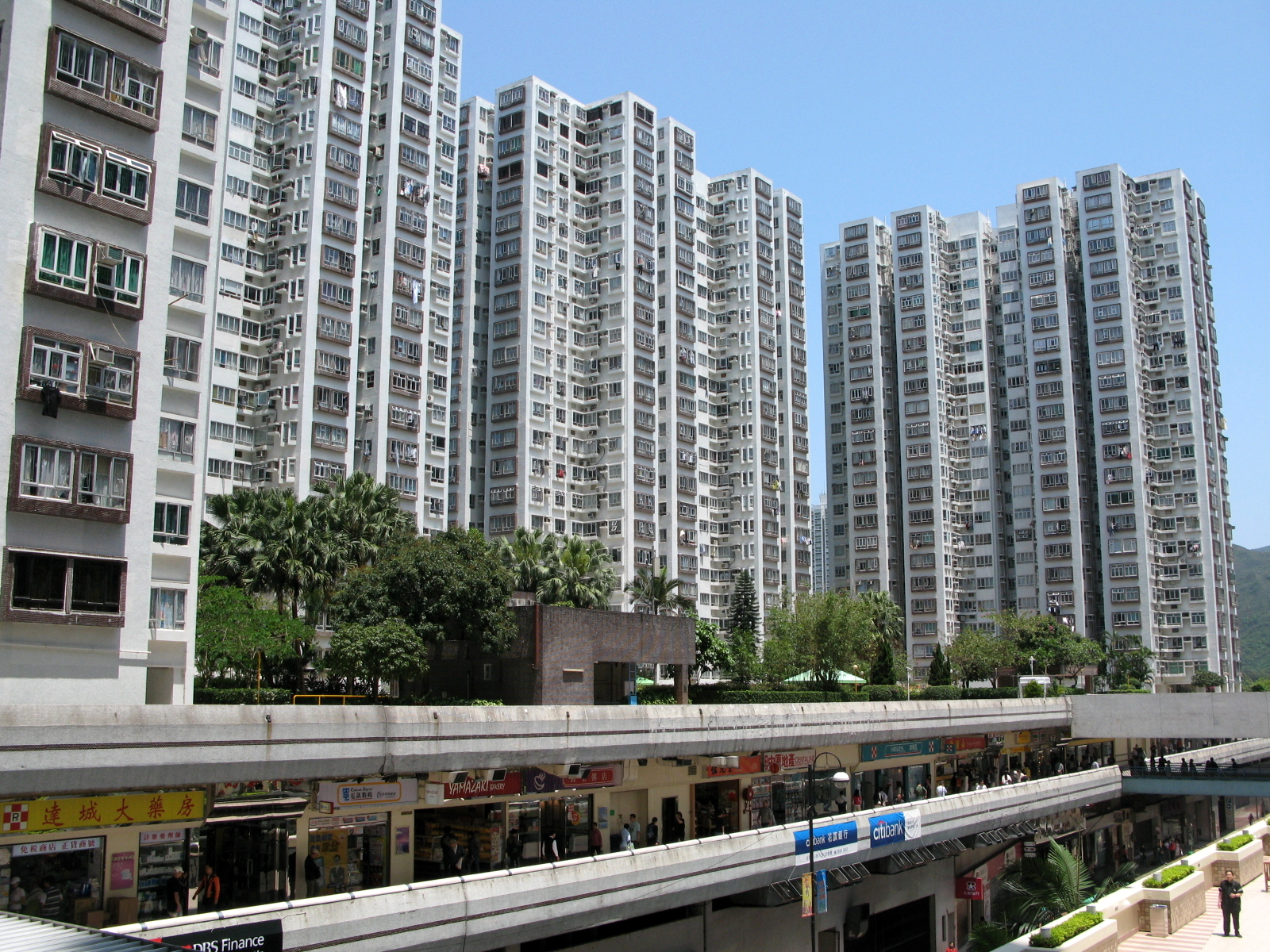 HK Lucky Plaza